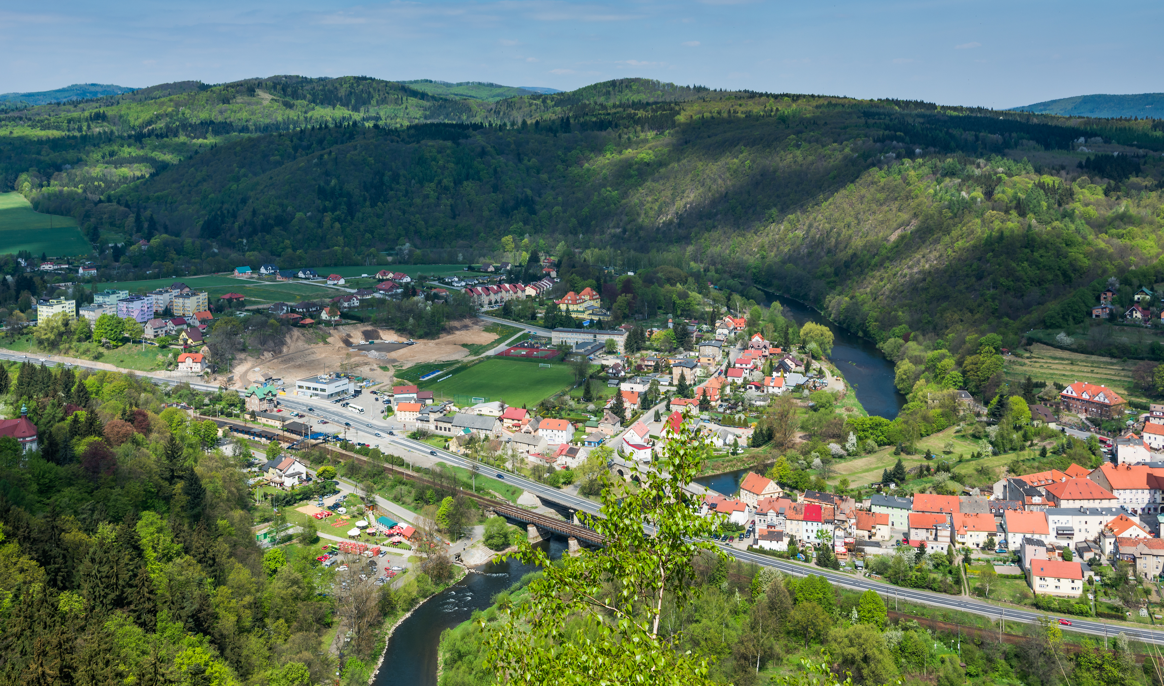 Zespół przyrodniczo-krajobrazowy Obryw skalny.